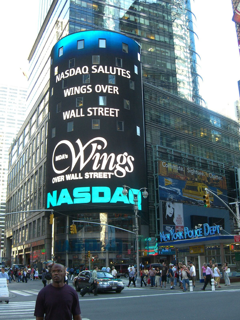 NASDAQ